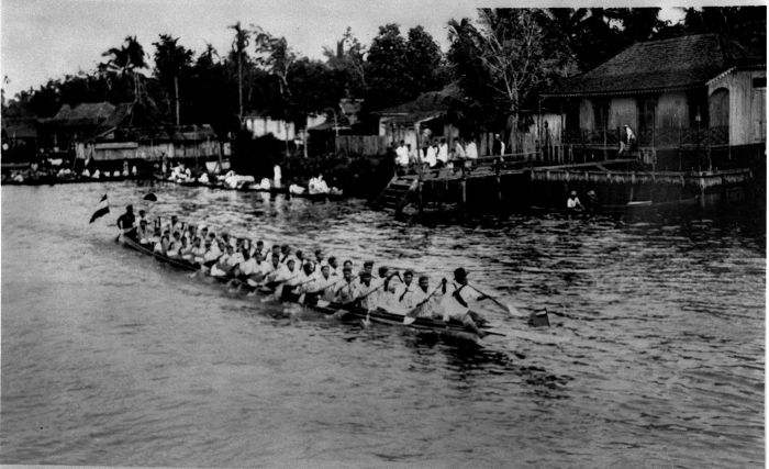 Foto. Roeiwedstrijden met prauwen op de rivier Kapuas